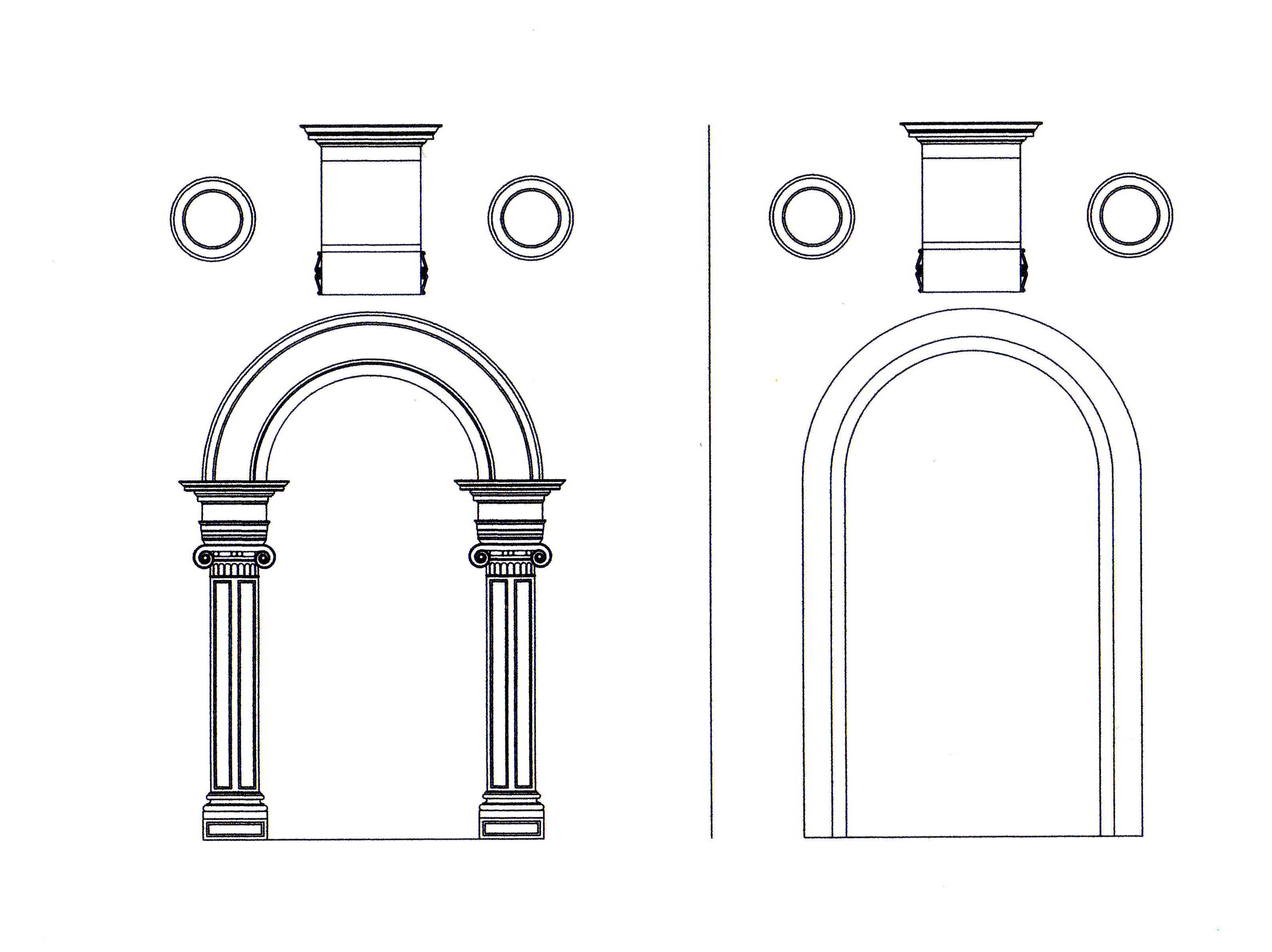 Orignal portal (left) and modern portal (right) in Palazzo Marigliano